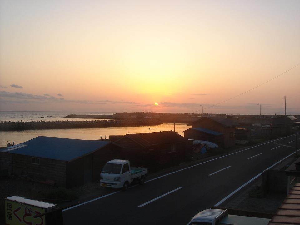 Sunrise at Ōma, Aomori. 大間町